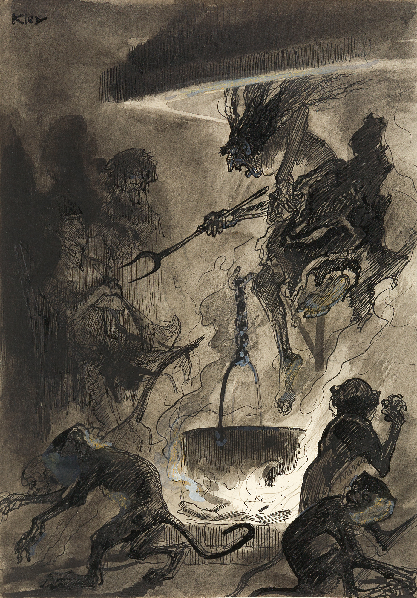 In der Hexenküche von Heinrich Kley. Tusche in Feder und Pinsel mit Lavierung, Deckweiß und Farbstift auf Papier, 29,5 x 20,7 cm, Links oben signiert